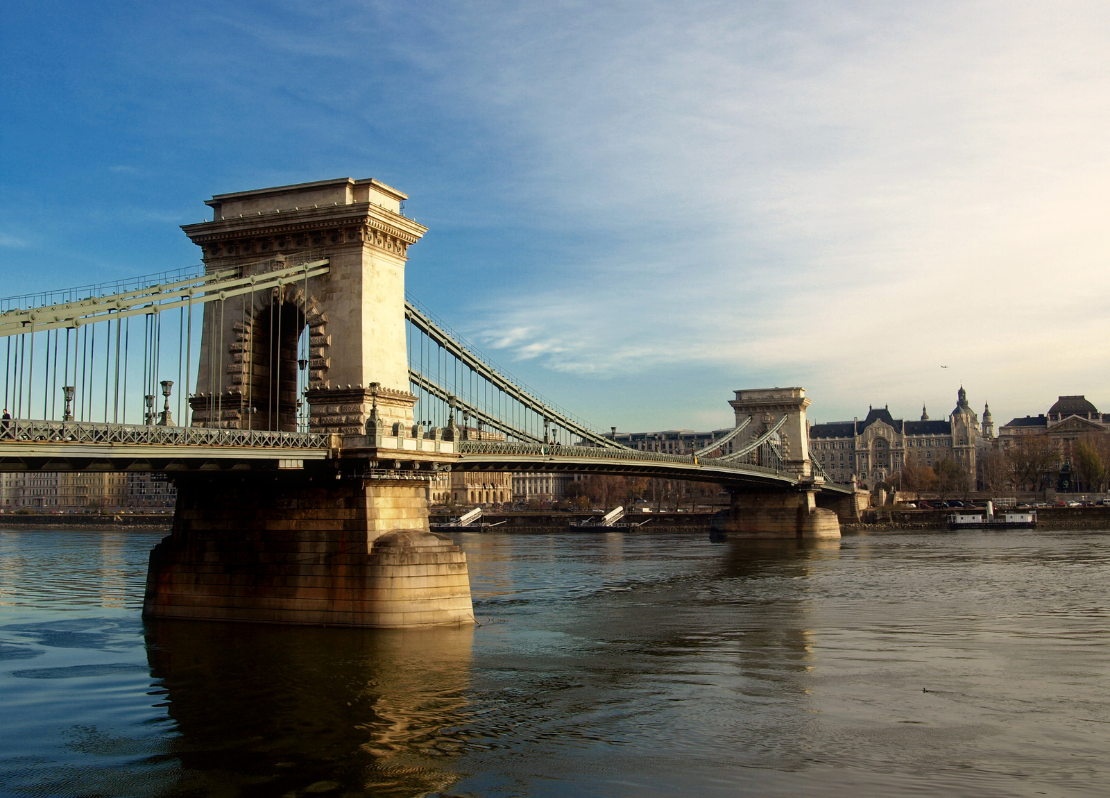 Lánchíd (Budapest, Lánchíd) This is a photo of a monument in Hungary. Identifier: 17